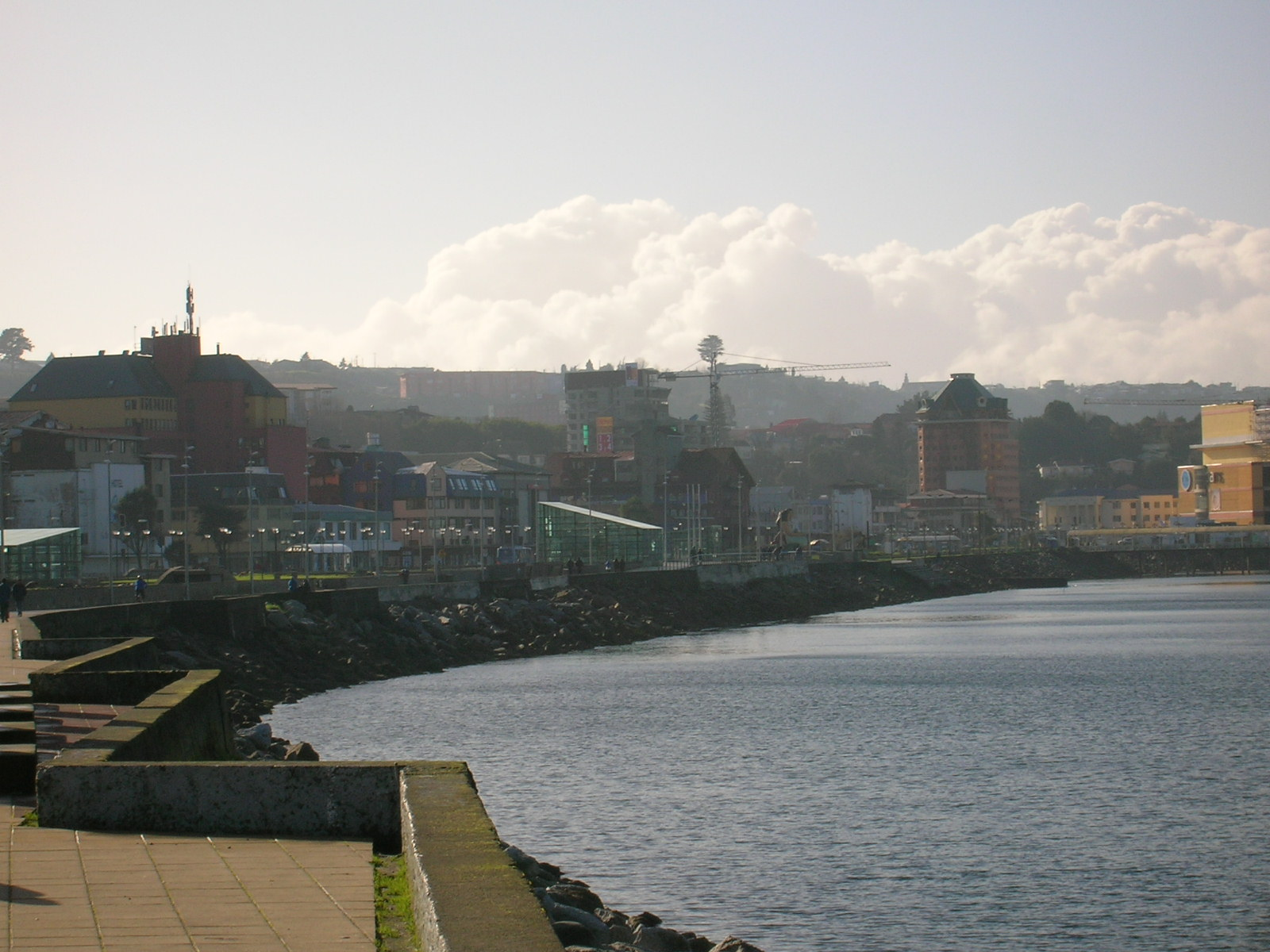 Vista de Puerto Montt desde la Costanera